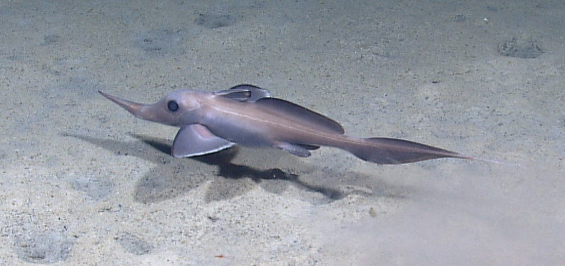 Rhinochimaera atlantica (Harriotta raleighana). Golfo de México 2012. El nombre Harriotta raleighana se considera sinonimia de Rhinochimaera atlantica por FishBase.